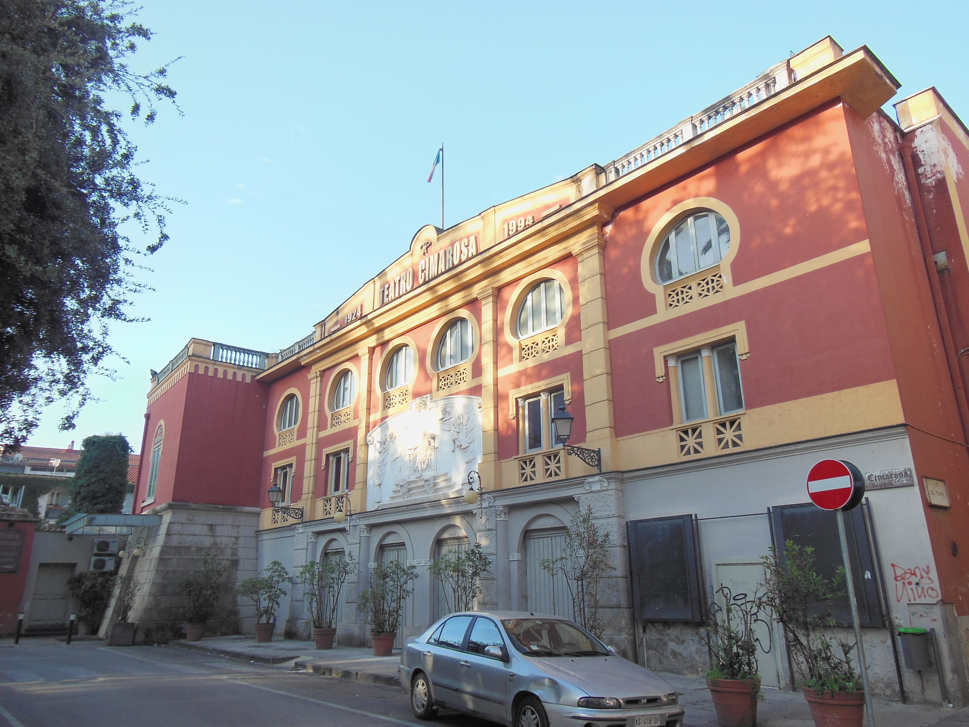 Opera propria